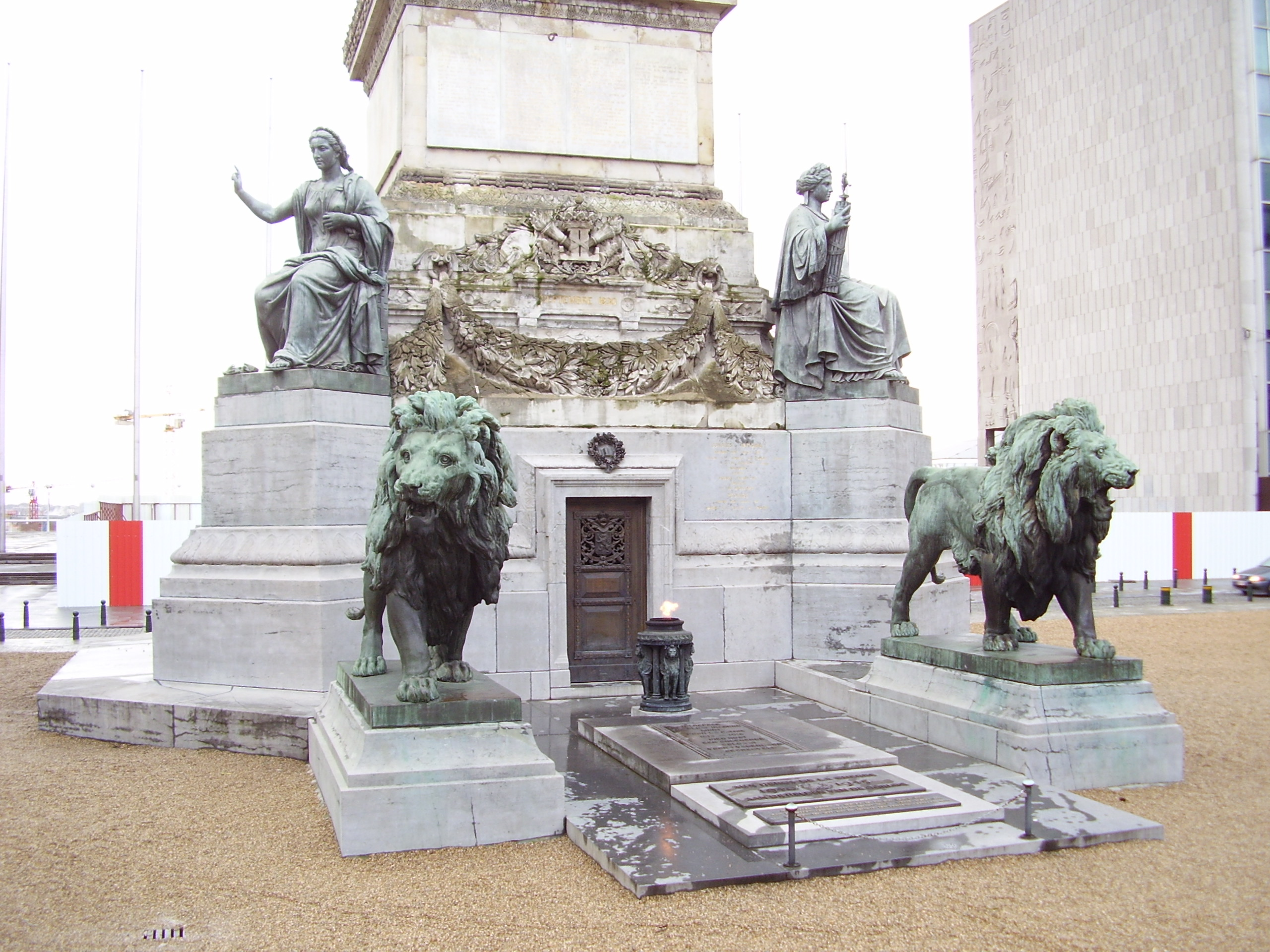 Colonne du Congrès Bruxelles, base du monument, Tombe du soldat inconnu et flamme éternelle, Liberté des cultes (gauche) et liberté d’association (droite)